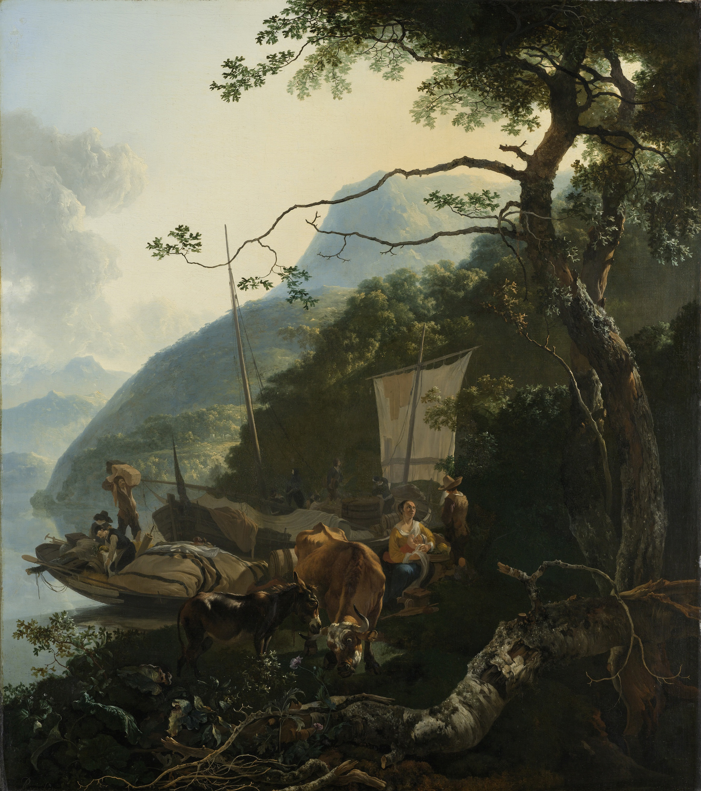 Italiaans berglandschap met schippers bezig met het laden en lossen van hun boten aan de oever van een meer. In het midden een moeder met een kind aan de borst, op de voorgrond een koe en een ezel. Misschien bedoeld als een voorstelling van de vlucht naar Egypte.; Adam Pijnacker (ca. 1620–1673), olieverf op doek op paneel, 1650–1670